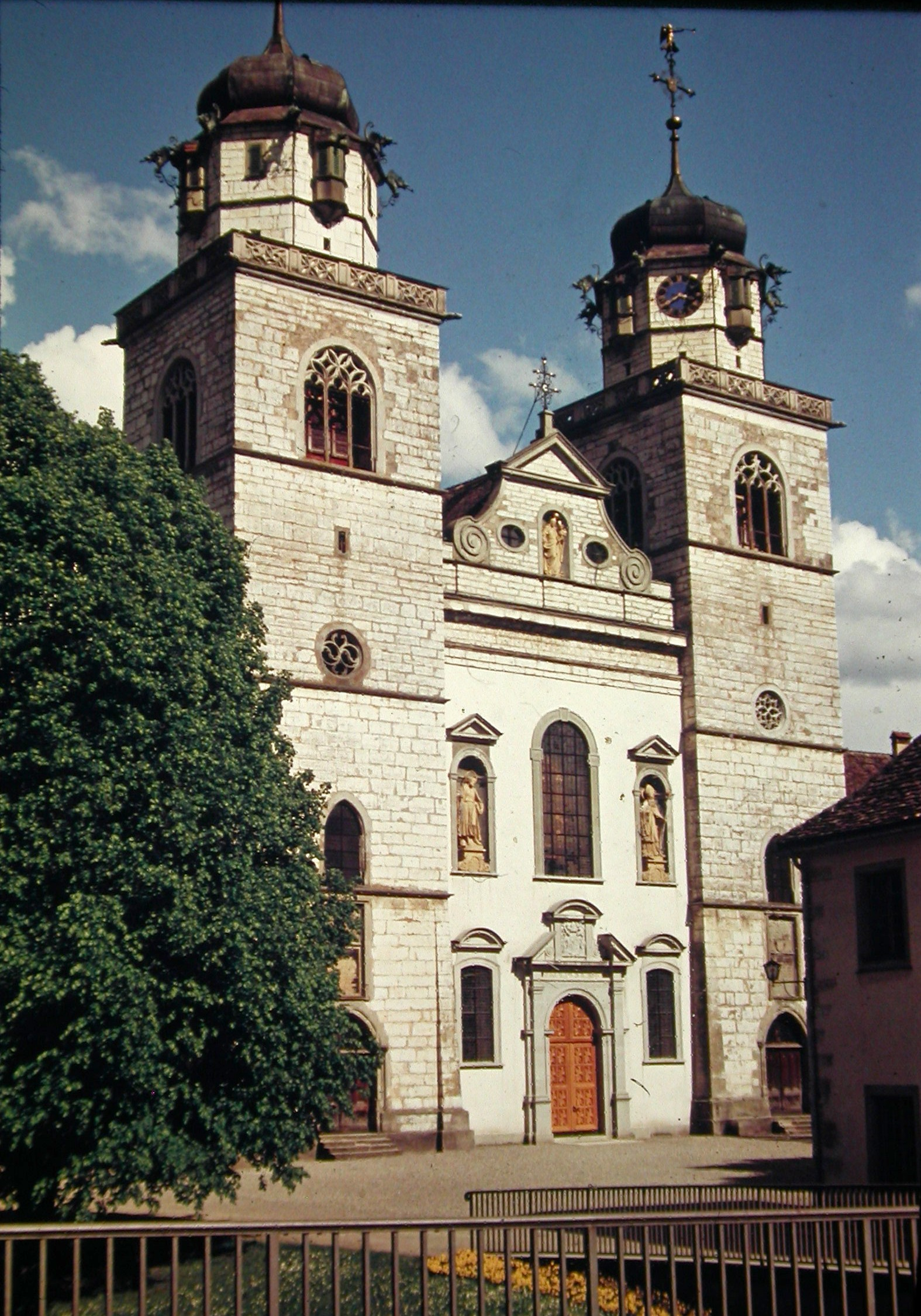 Rheinau Auffahrt 1955